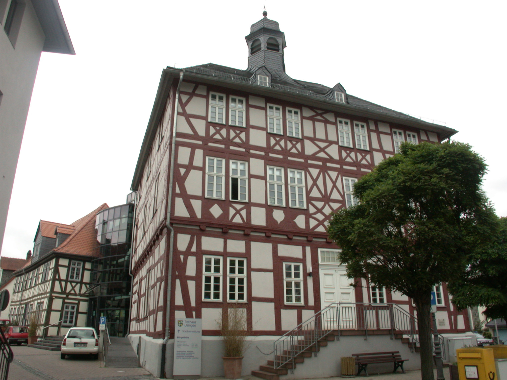 Rathaus Usingen, Deutschland